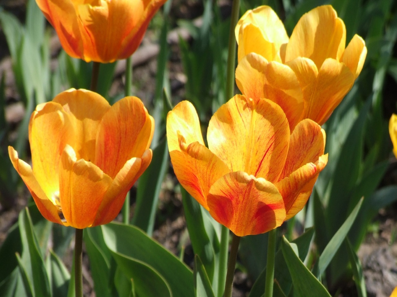 Tulipan Darwina 'Beauty of Apeldoorn'